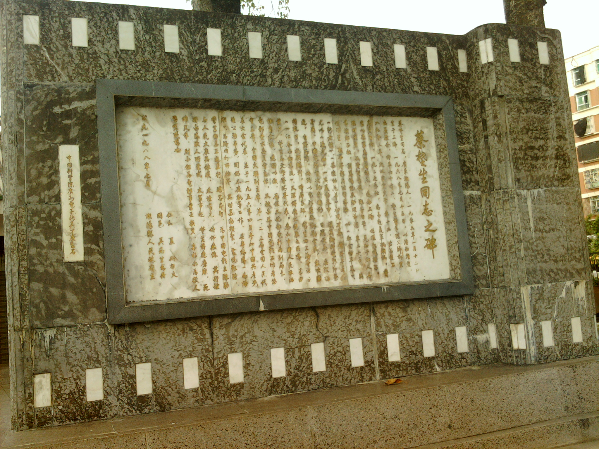 夏衍撰文，吴南生书丹